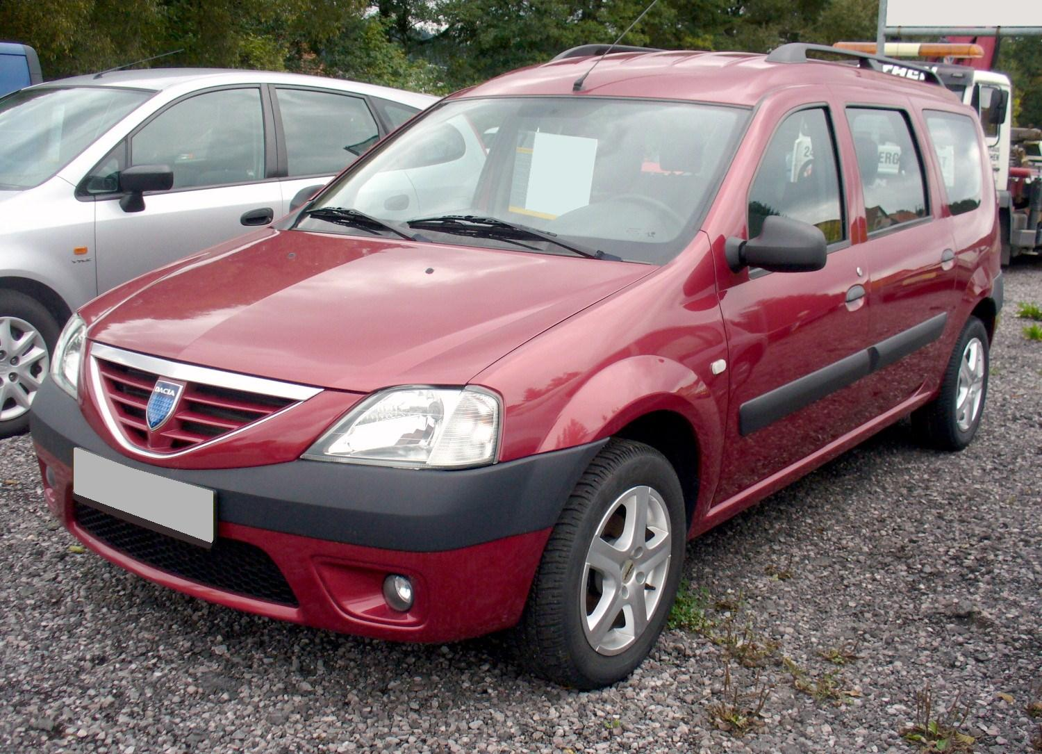 Dacia Logan MCV